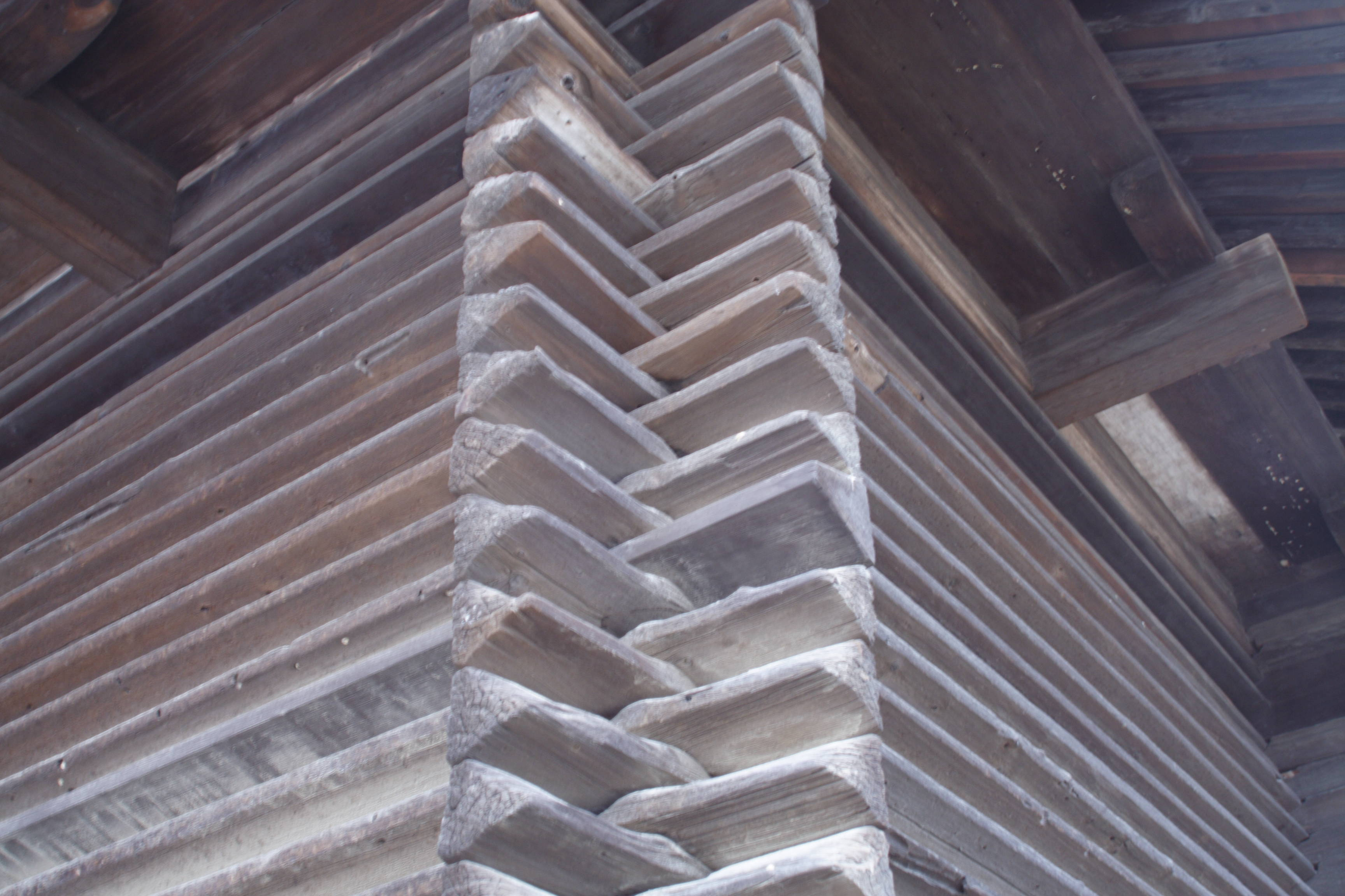 Azekuradukuri/校倉造 in Todaiji